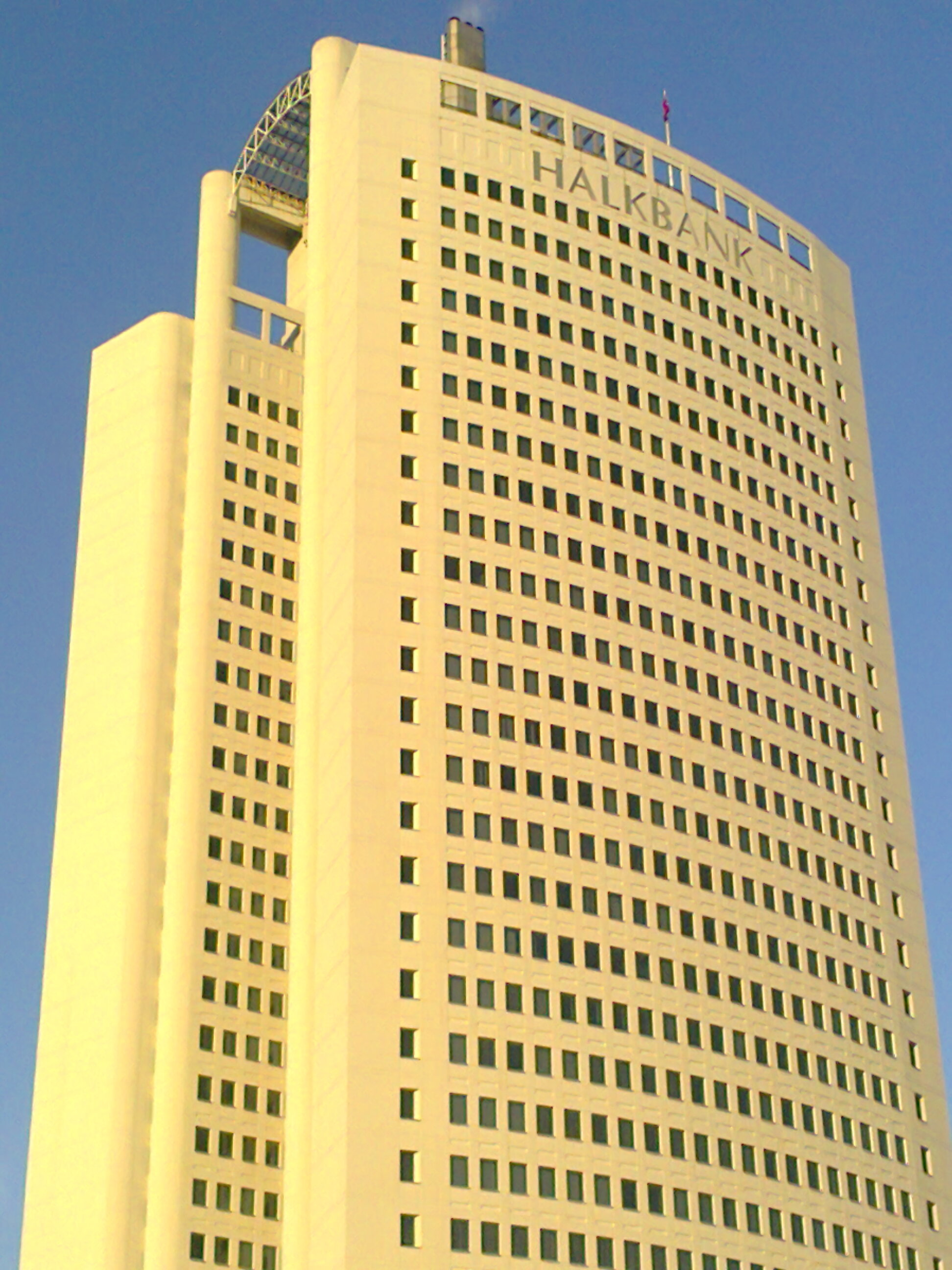 Halkbank Genel Müdürlük binası - Ankara